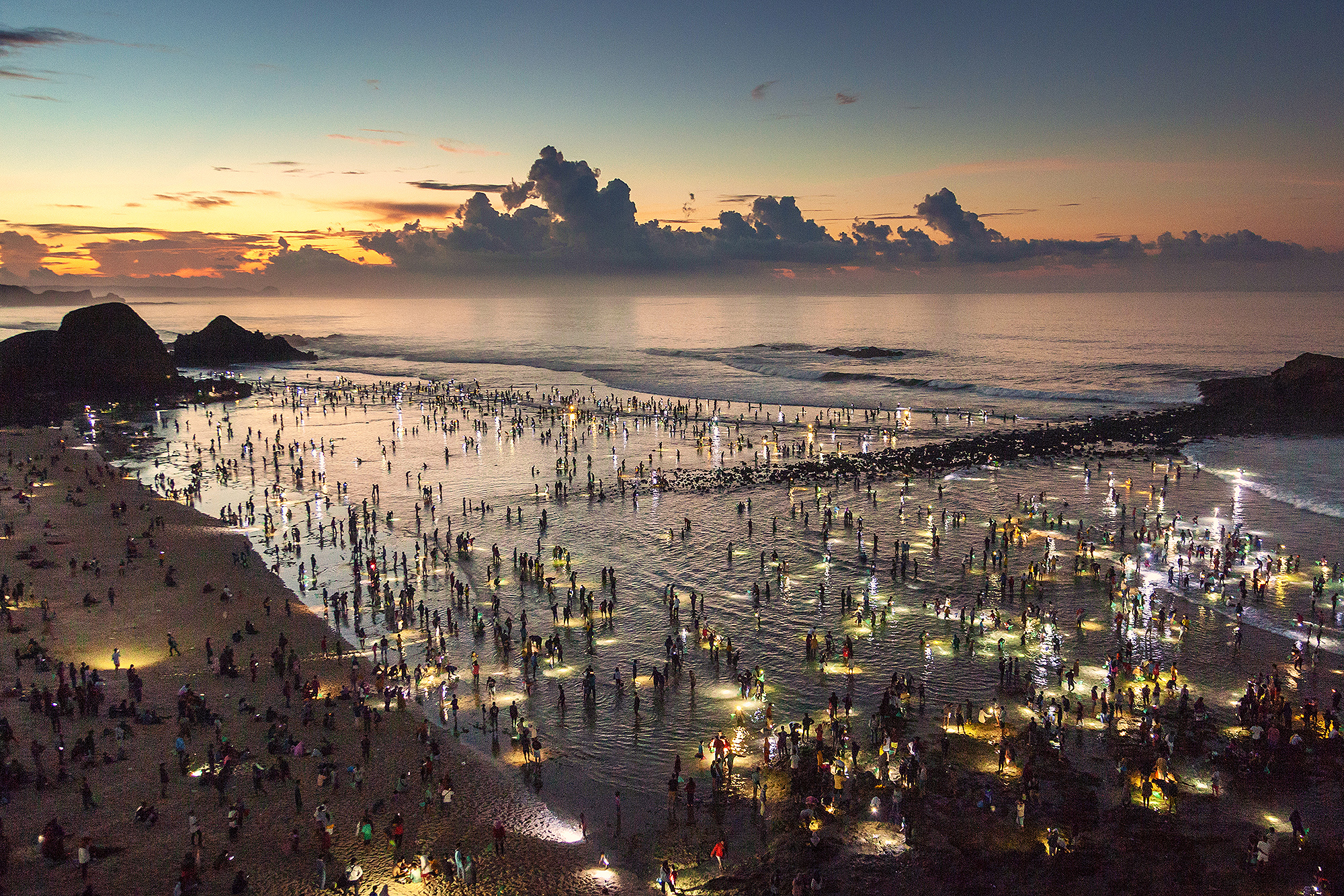 Tradisi berburu cacing laut di sepanjang pantai selatan pulau Lombok oleh ribuan warga. Tradisi ini merupakan perayaan setiap tahunnya dan memiliki nilai sakral bagi suku Sasak, Lombok.